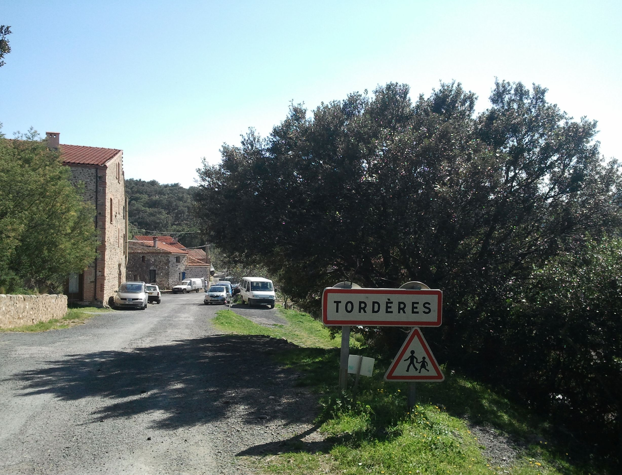 L'entrée de Tordères par le chemin de Thuir